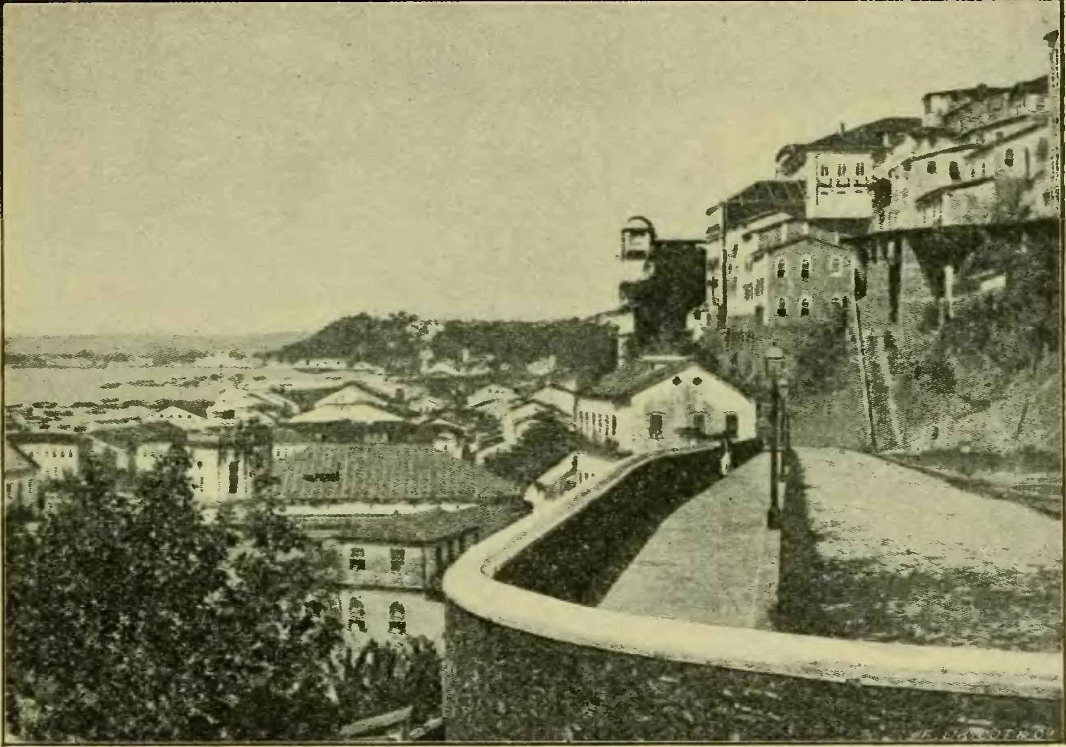 Vista da cidade Salvador, Bahia, circa 1903